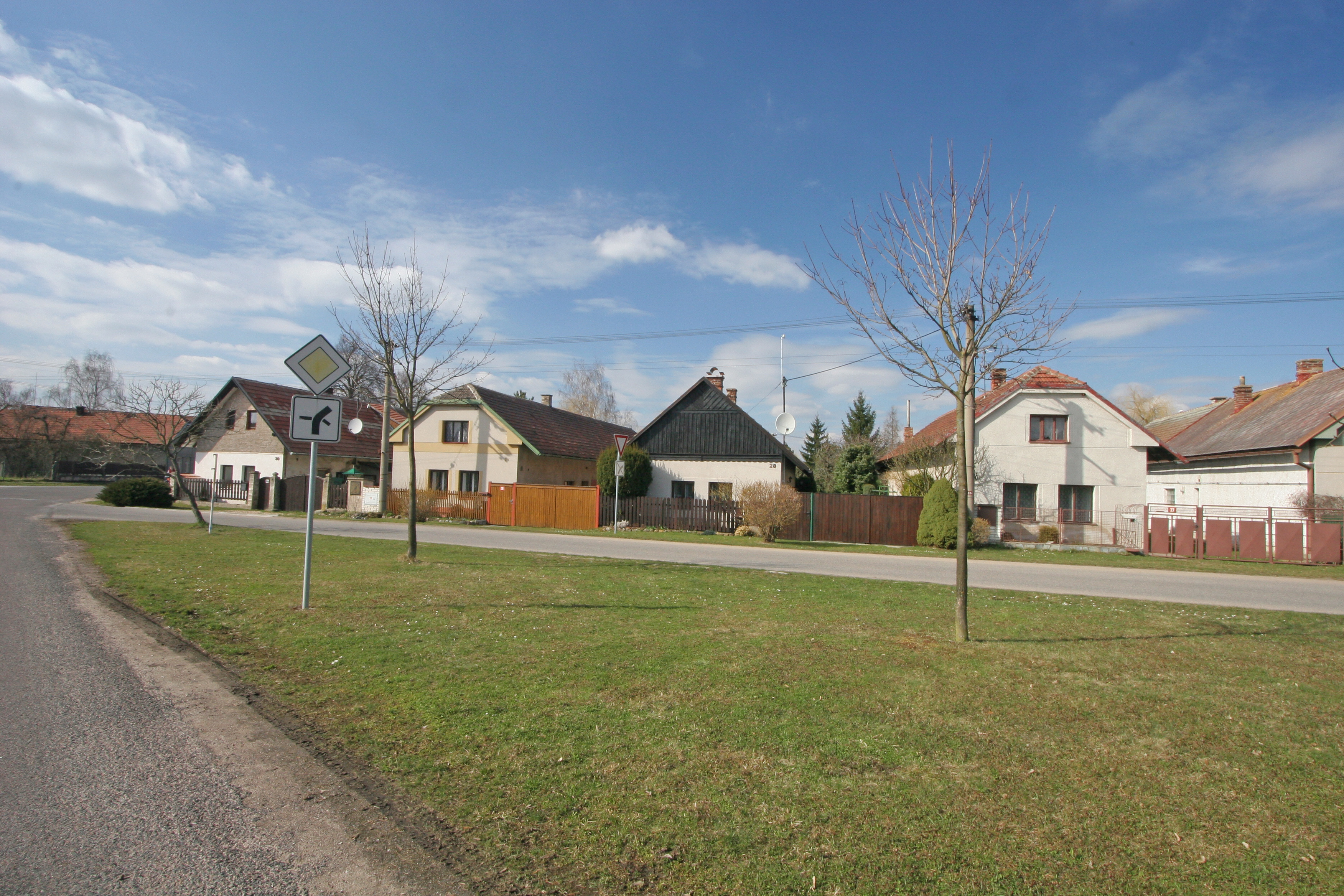 Písek čp. 28